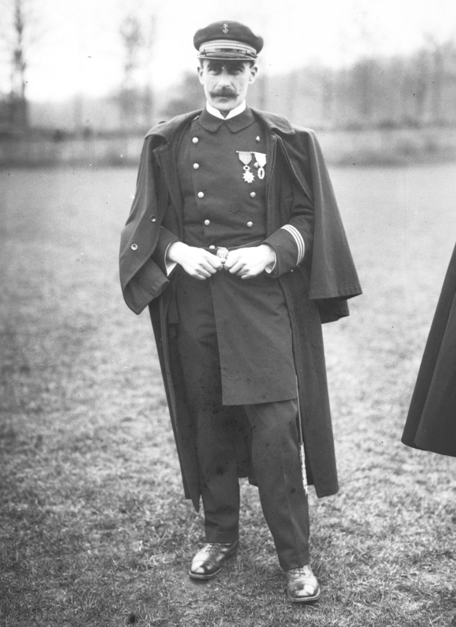 Lieutenant de Vaisseau Hébert, 1913